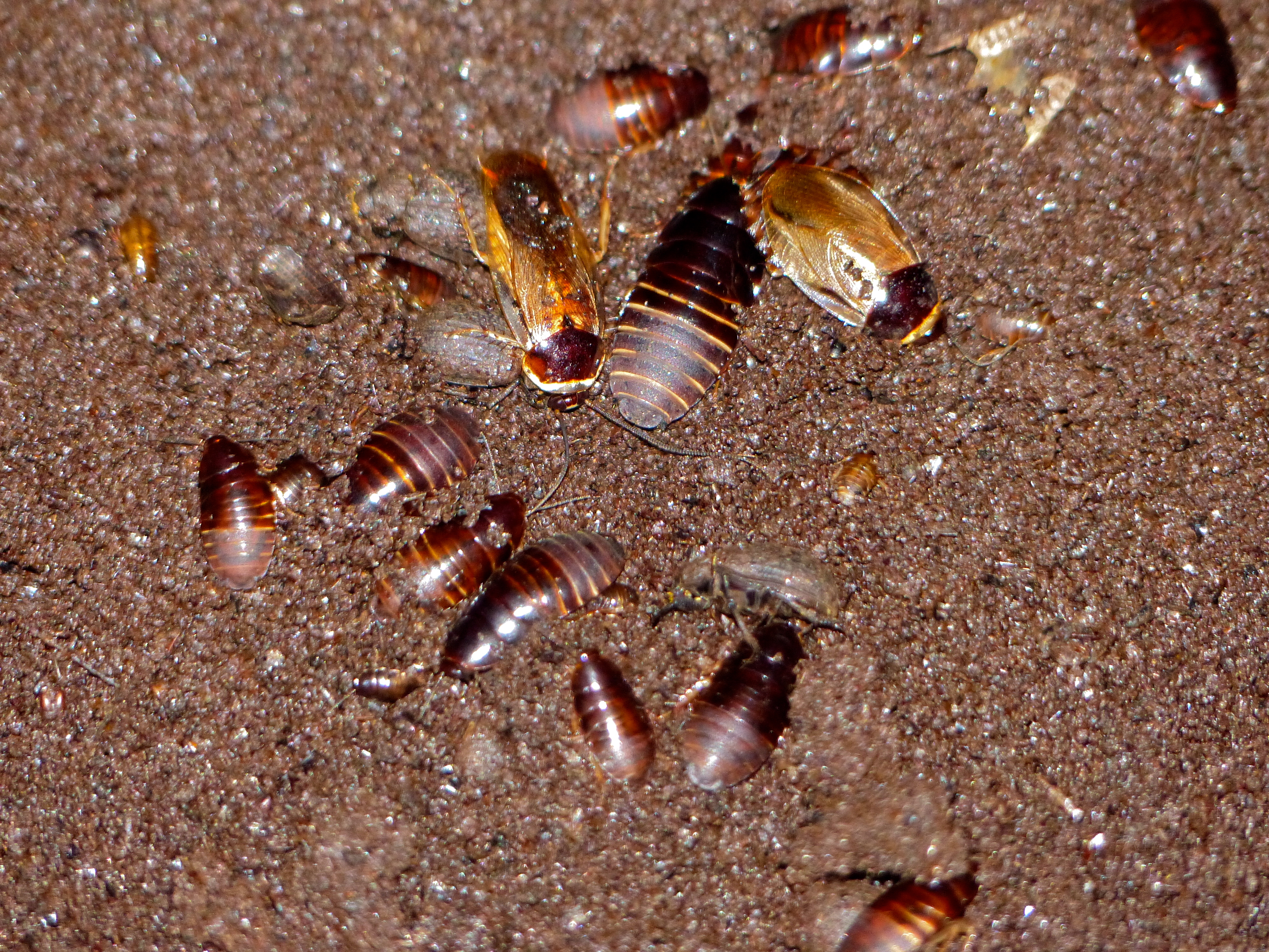 Deer Cave, Mulu NP, Sarawak, MALAYSIA